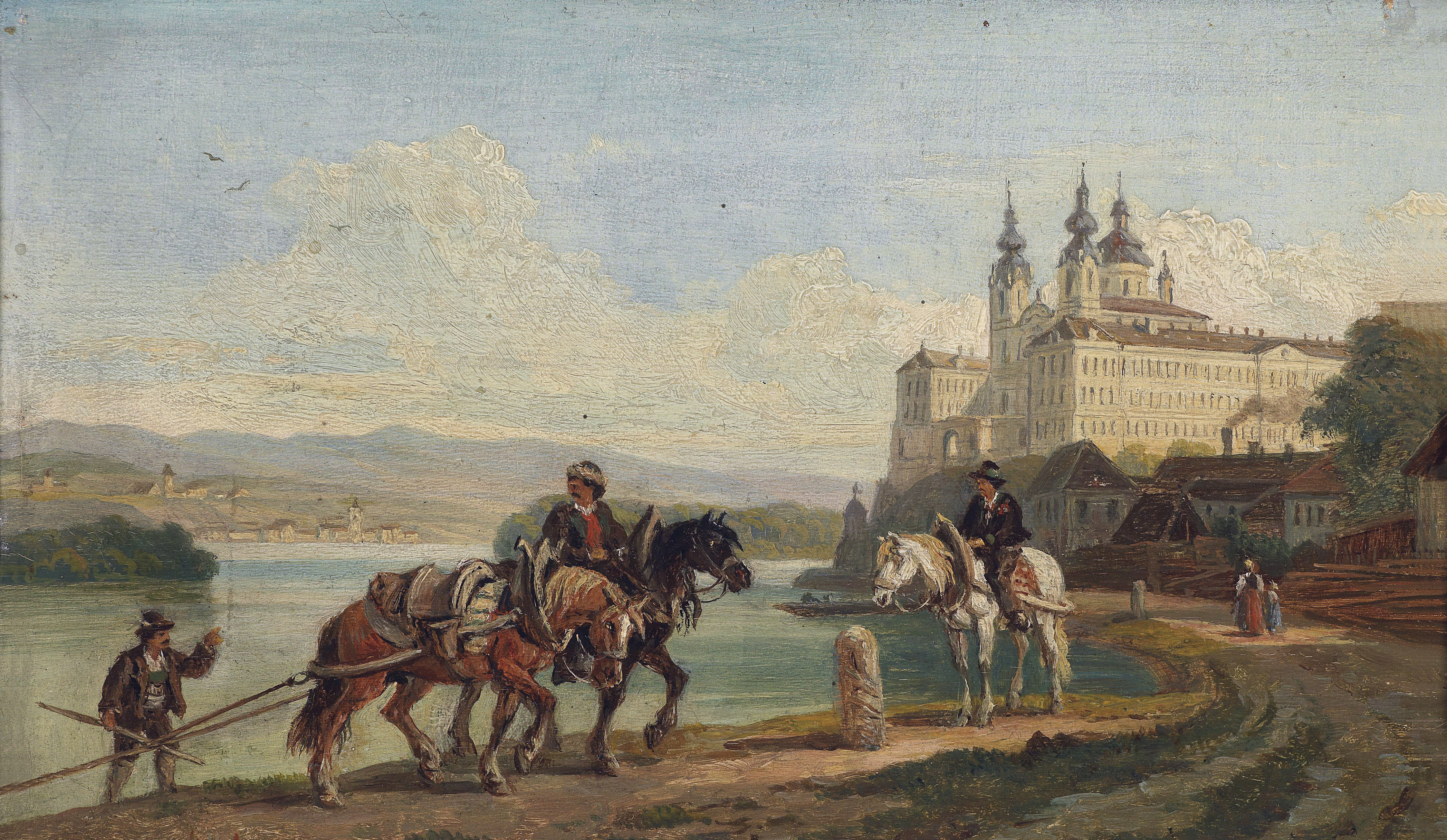 Blick auf Melk/Donau